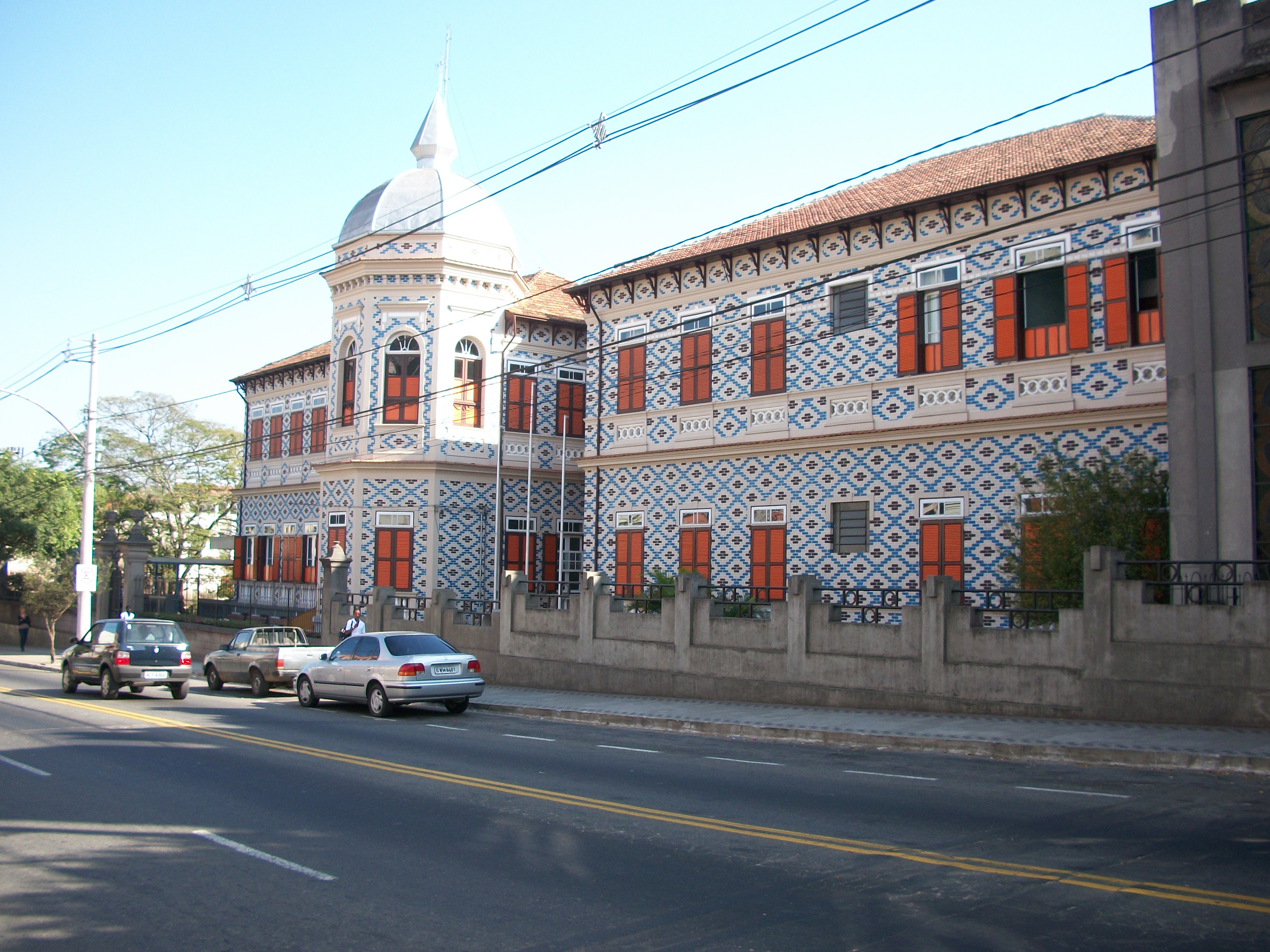 Fachada do Colégio Santa Catarina em Juiz de Fora - Minas Gerais - Brasil.